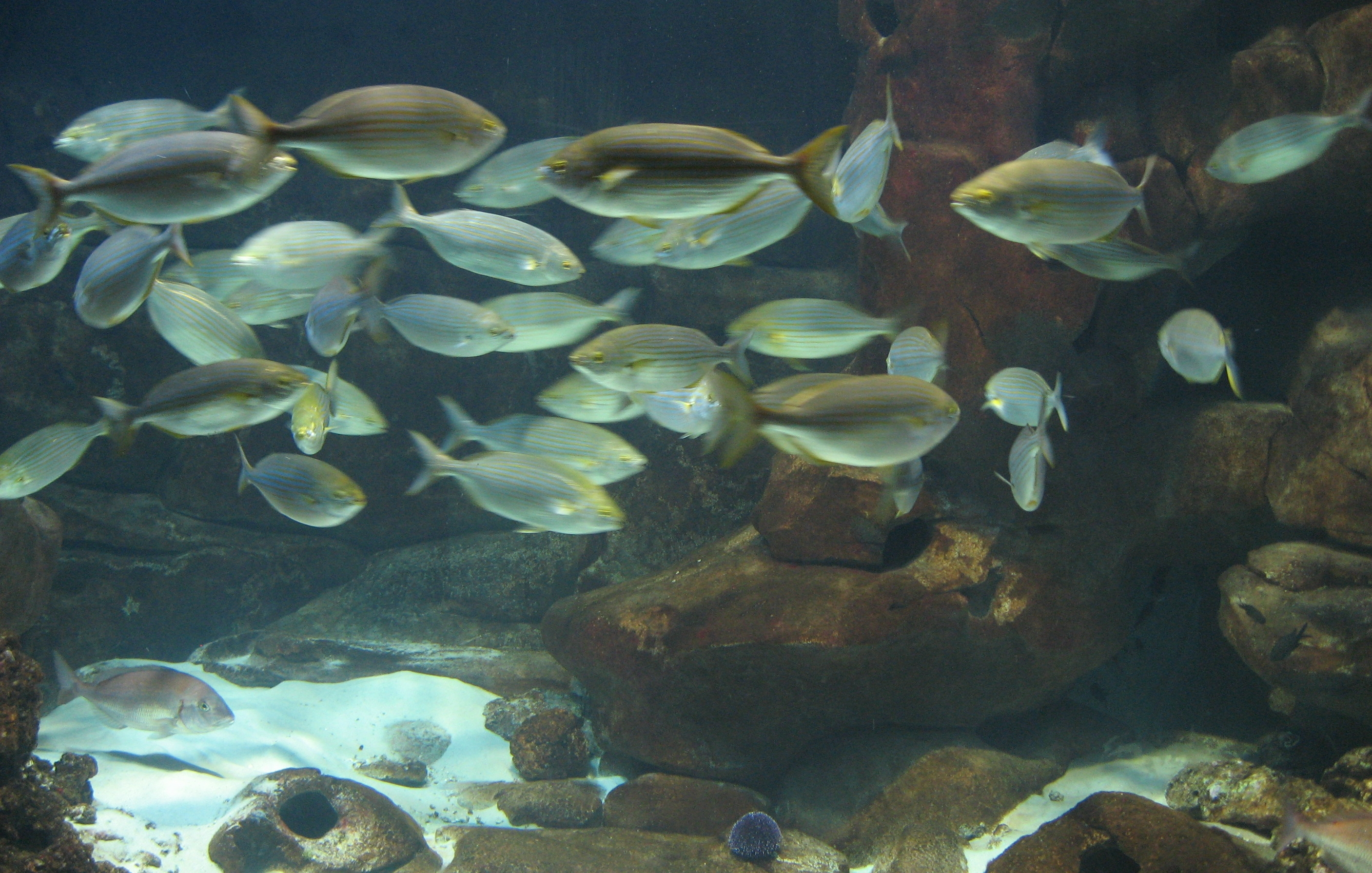 Sarpa salpa in Aquarium Cinéaqua Map: 48° 51' 44" N 2° 17' 27" E